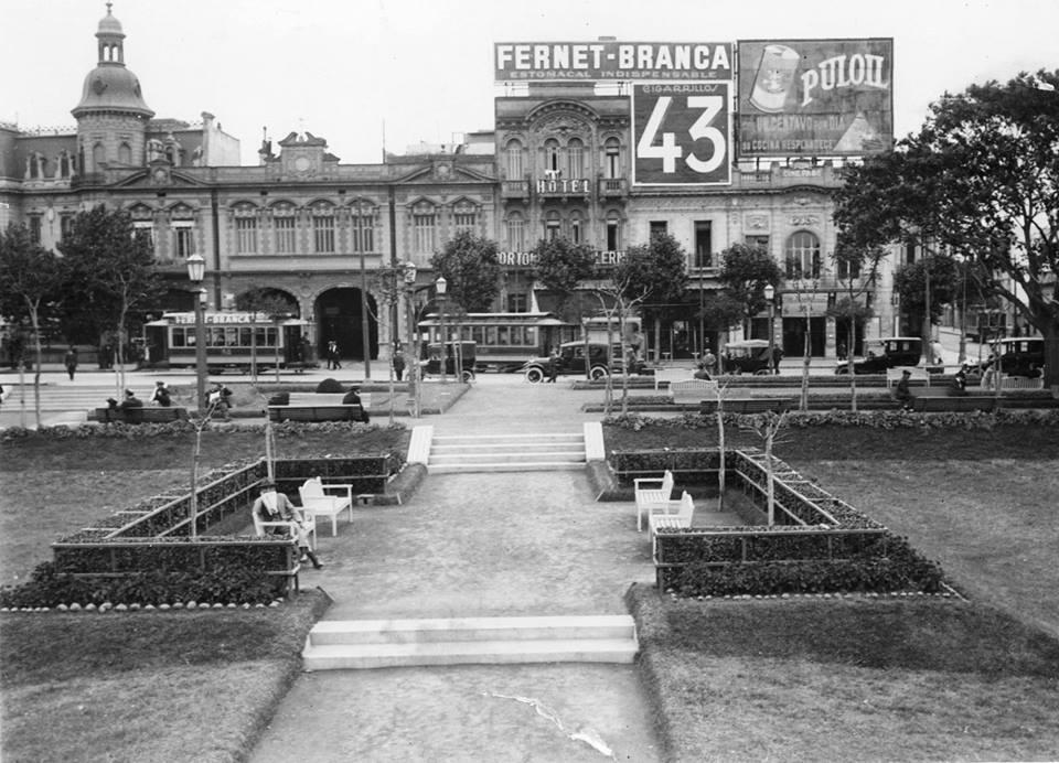 Plaza Italia, Buenos Aires 1924. Inventario 10400 General Archive of the Nation Native nameArchivo General de la Nación ArgentinaLocationBuenos Aires, ArgentinaCoordinates34° 36′ 17″ S, 58° 22′ 14″ W Established28 August 1821Web pageAGNAuthority control : Q2860529 ISNI: 0000 0001 2375 5869 institution QS:P195,Q2860529 This file, was provided to Wikimedia Commonsthanks to an agreement between the General Archive of the Nation of Argentina and Wikimedia Argentina.